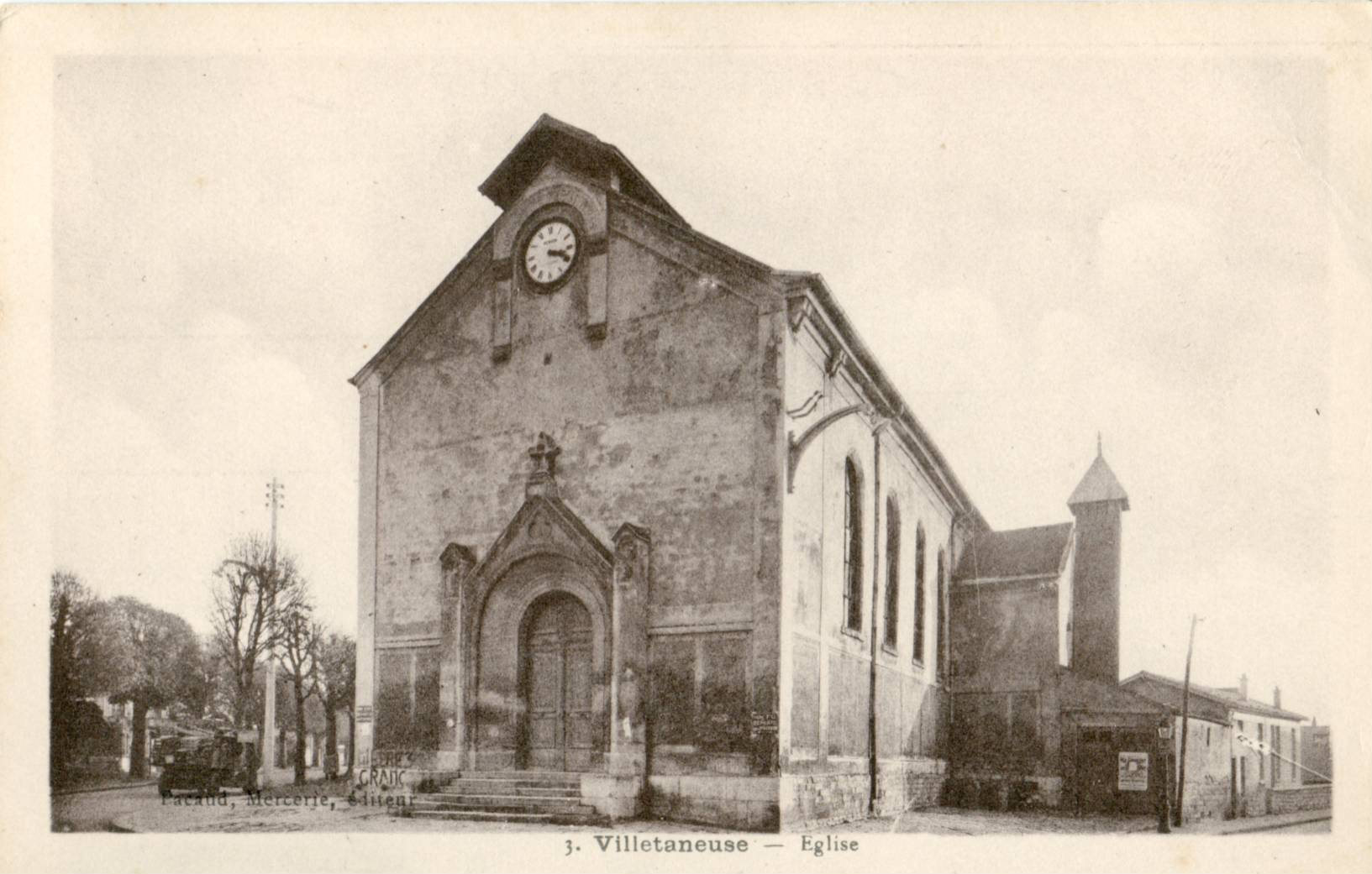 Carte postale semi moderne éditée par Pacaud, N°3